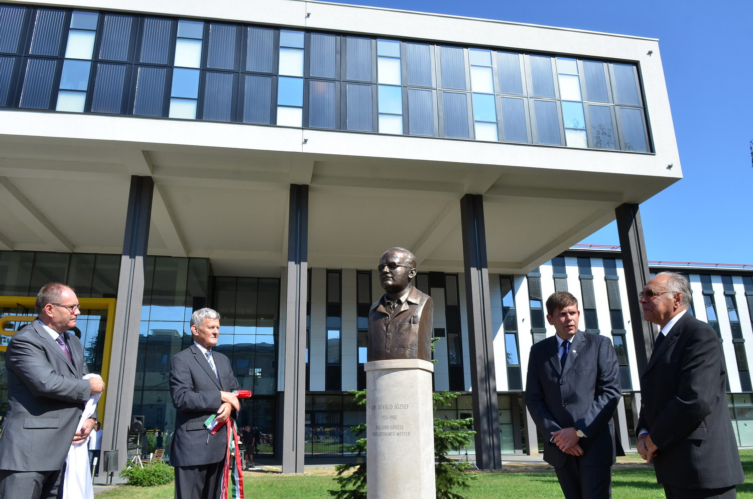 Szobor a Csillagpont Tömb előtti Gyógyítók parkjában.